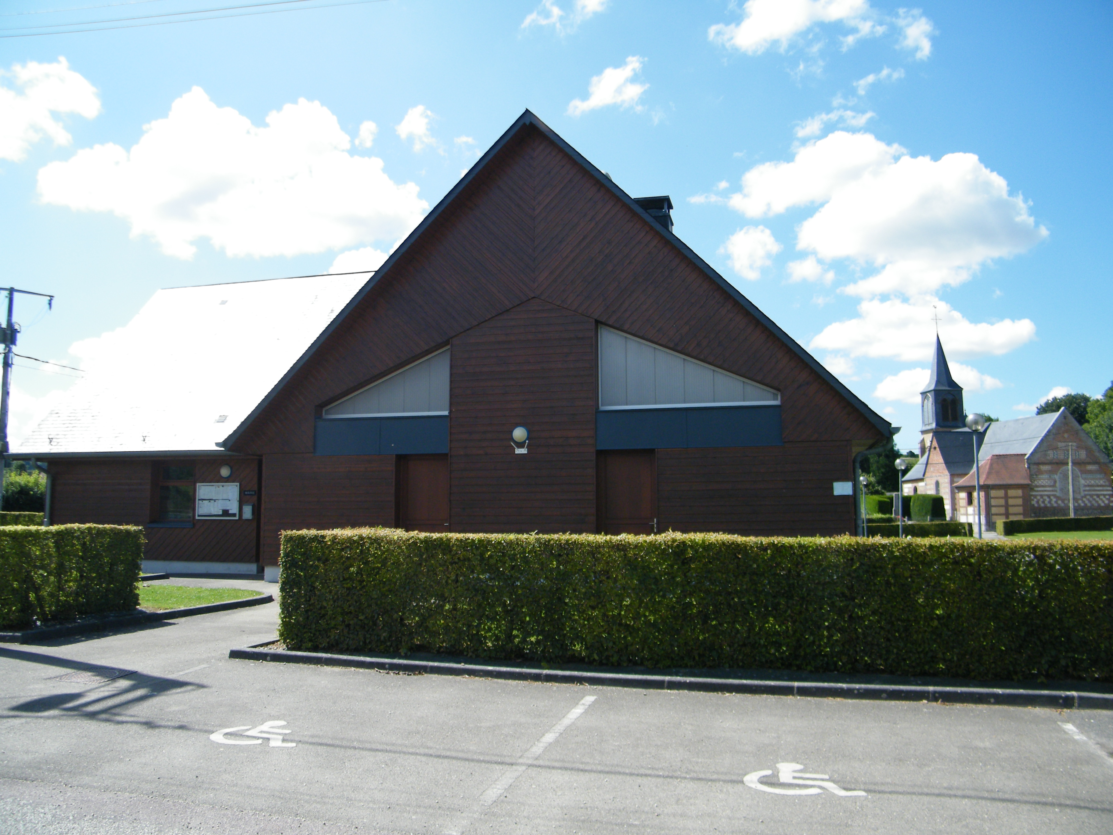 Baillolet, Seine-Maritime, France, mairie.